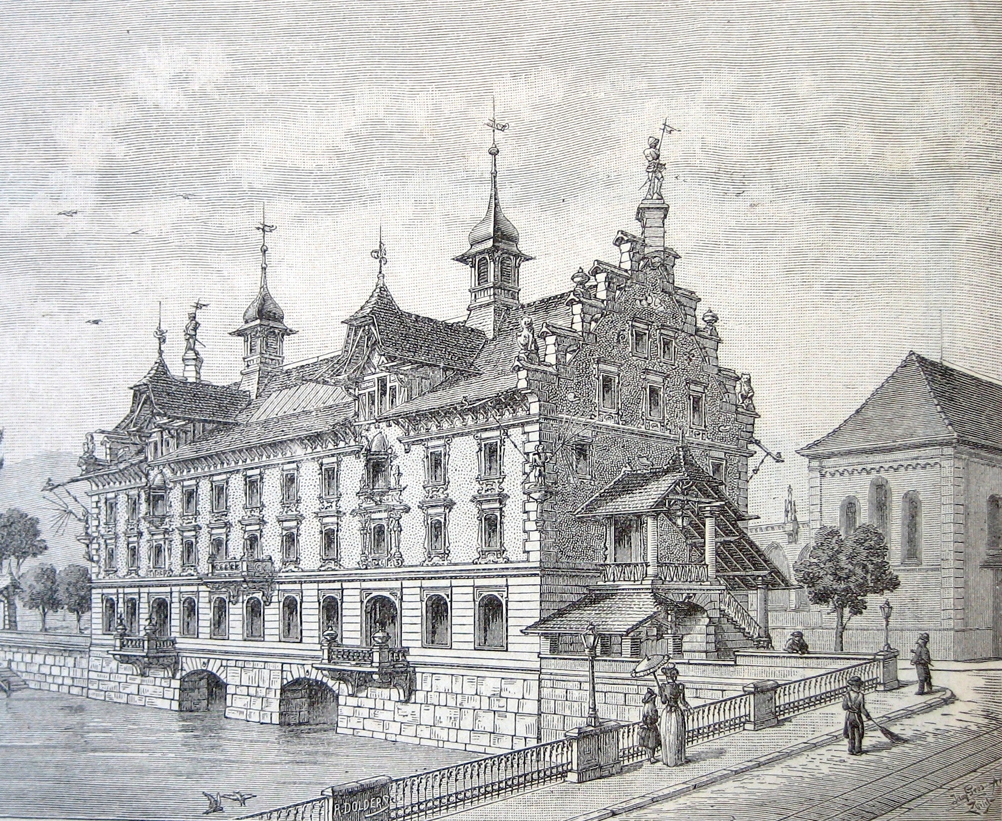 nie verwirklichtes Umbauprojekt für das Kaufhaus von 1892